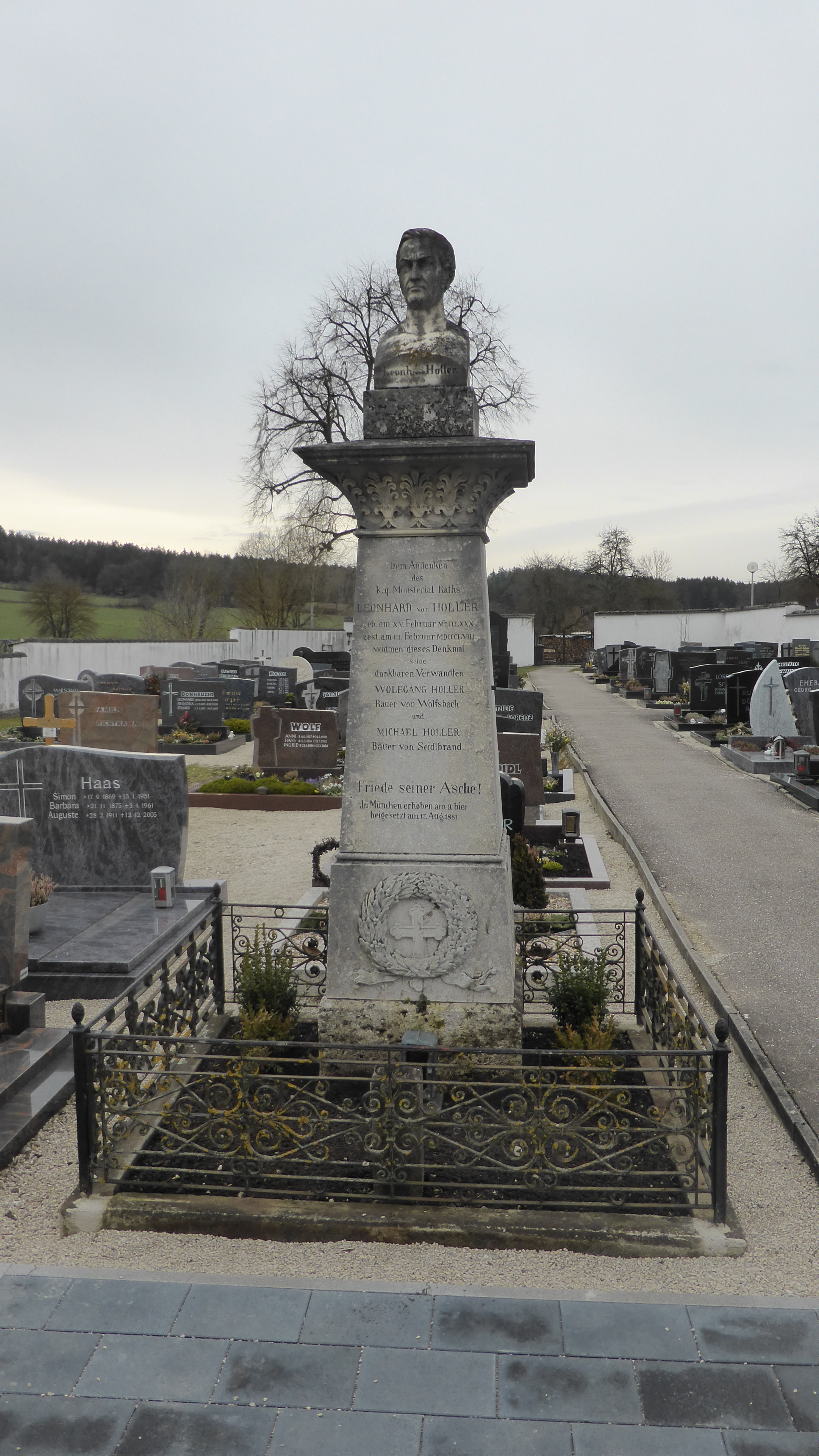 Friedhofskapelle (Wolfsbach)-Leonhard von Holler